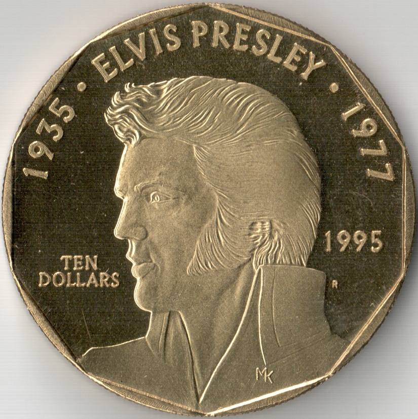 Marshall islands 10 dollars 1995 Elvis Presley